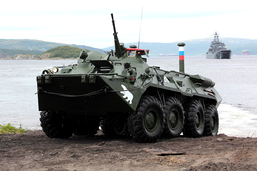 Морские пехотинцы Северного флота отработали высадку морского десанта с БДК на бронетранспортерах.